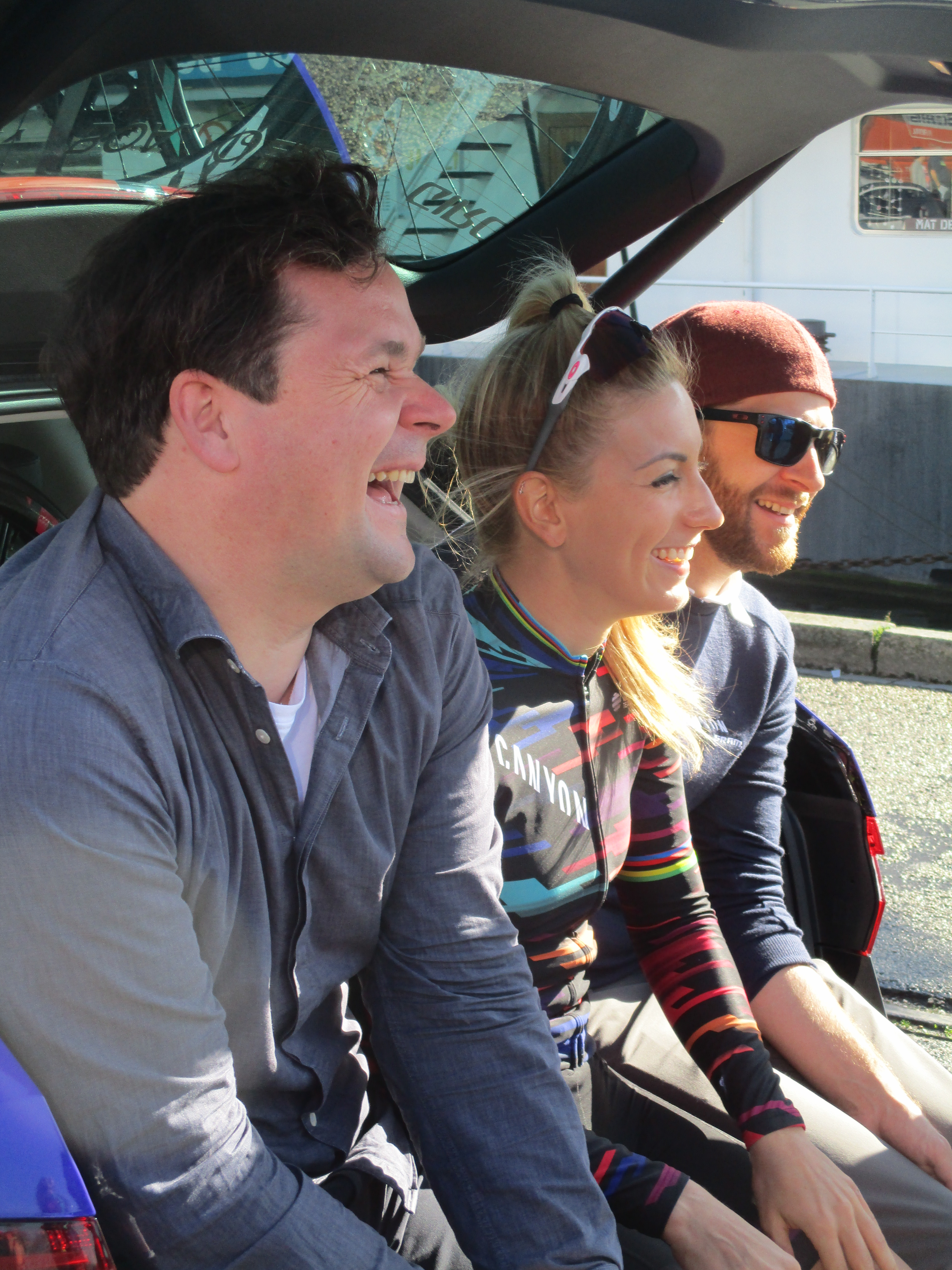 Start van de Amstel Gold Race Ladies Edition 2018 in Maastricht.